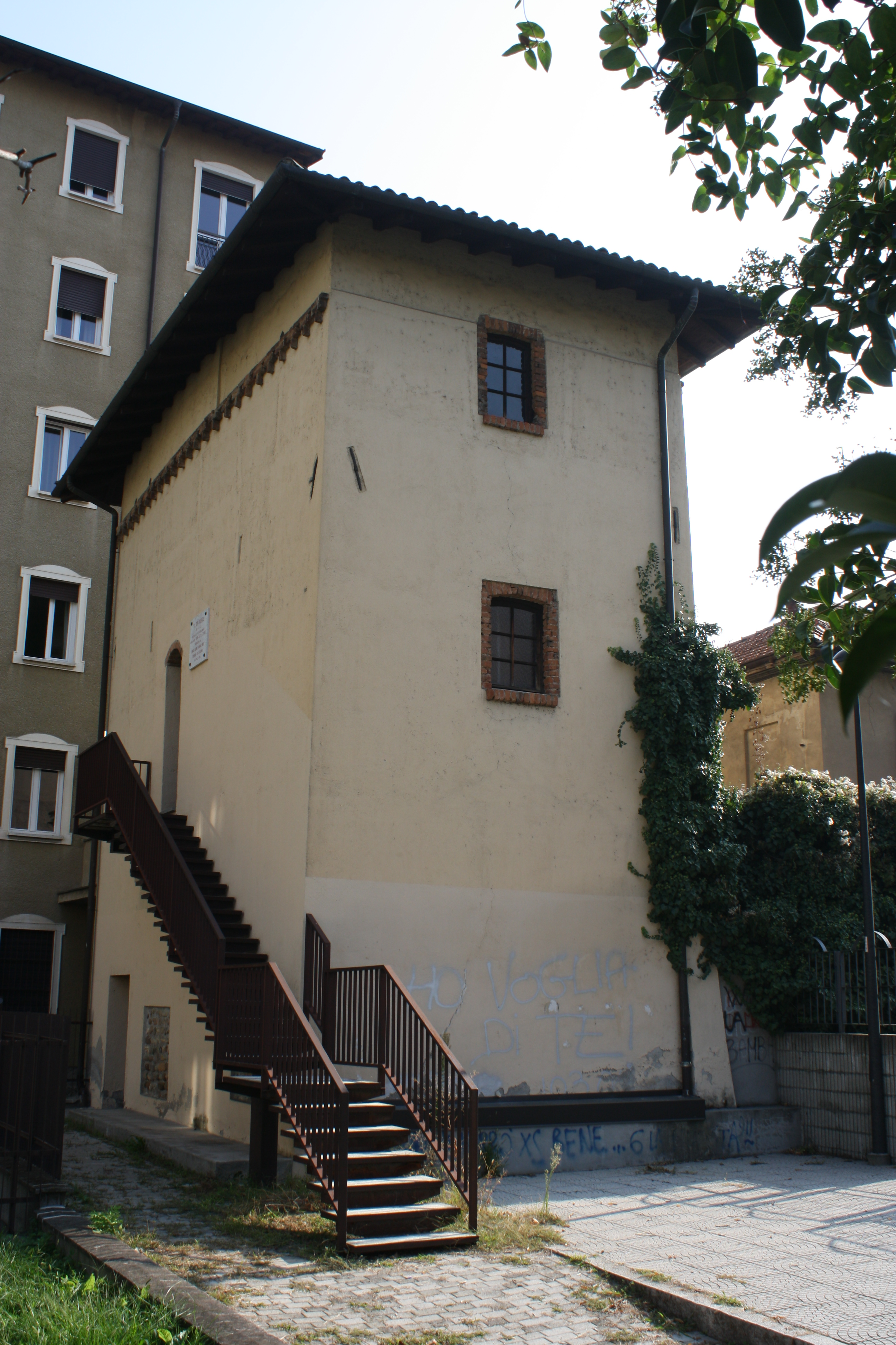 Torre Colombera a Legnano This is a photo of a monument which is part of cultural heritage of Italy.